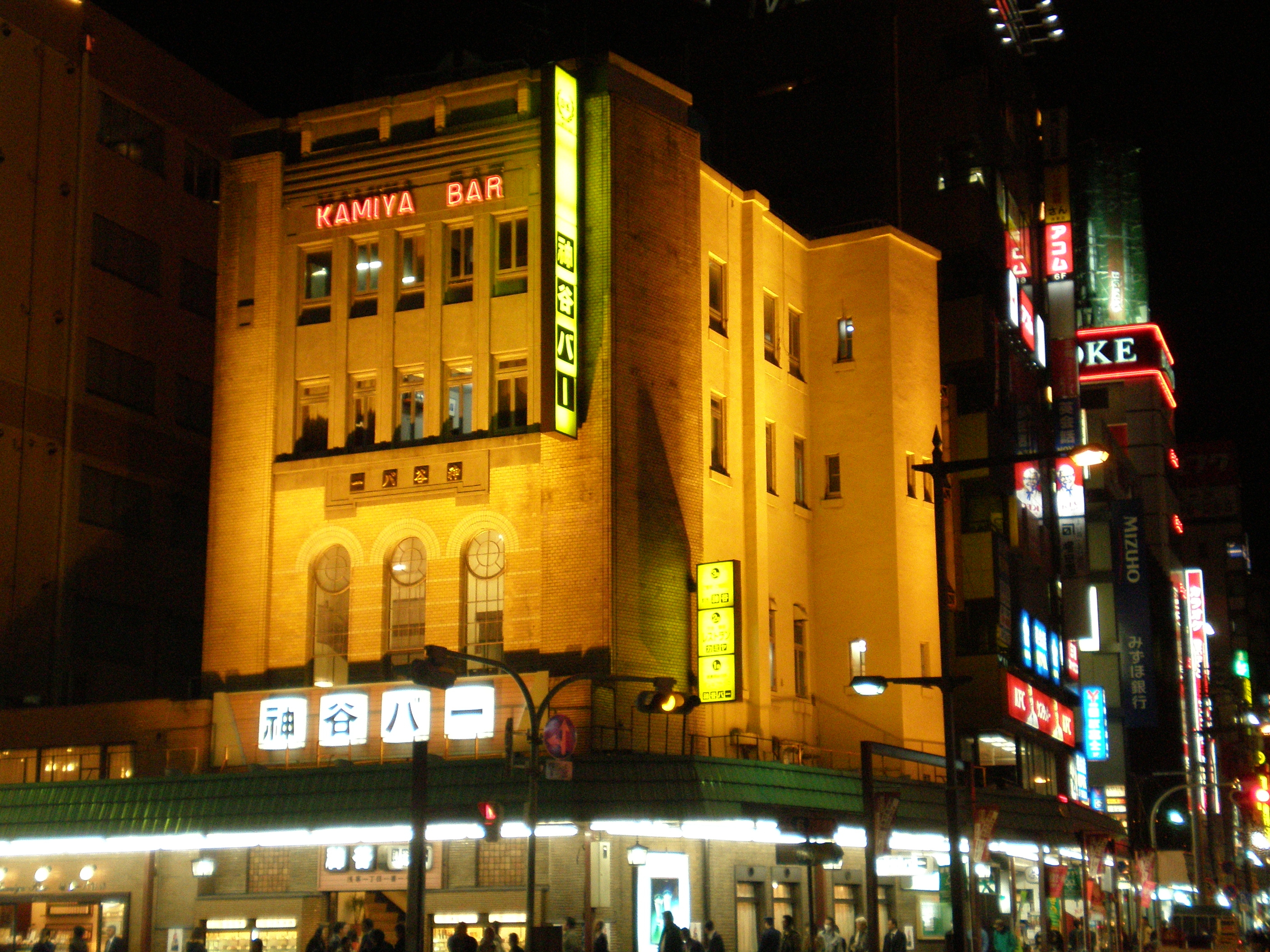 Kamiya Bar at Asakusa Tokyo.